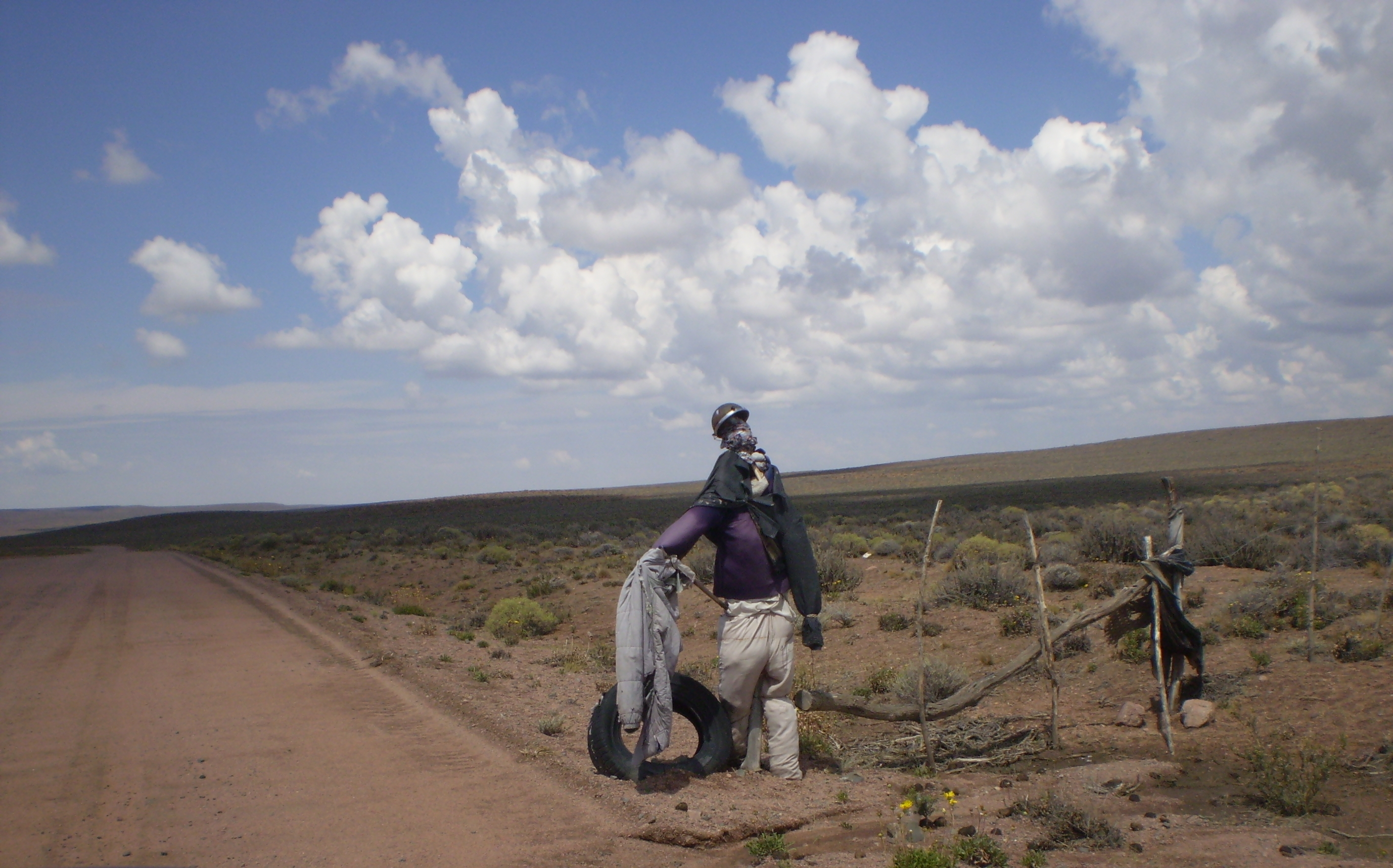 Monigotes armados por los lugareños para alertar de la presencia de guardaganados o alambrados a la vera de la ruta provincial nro 6 Río Negro, Patagonia Argentina